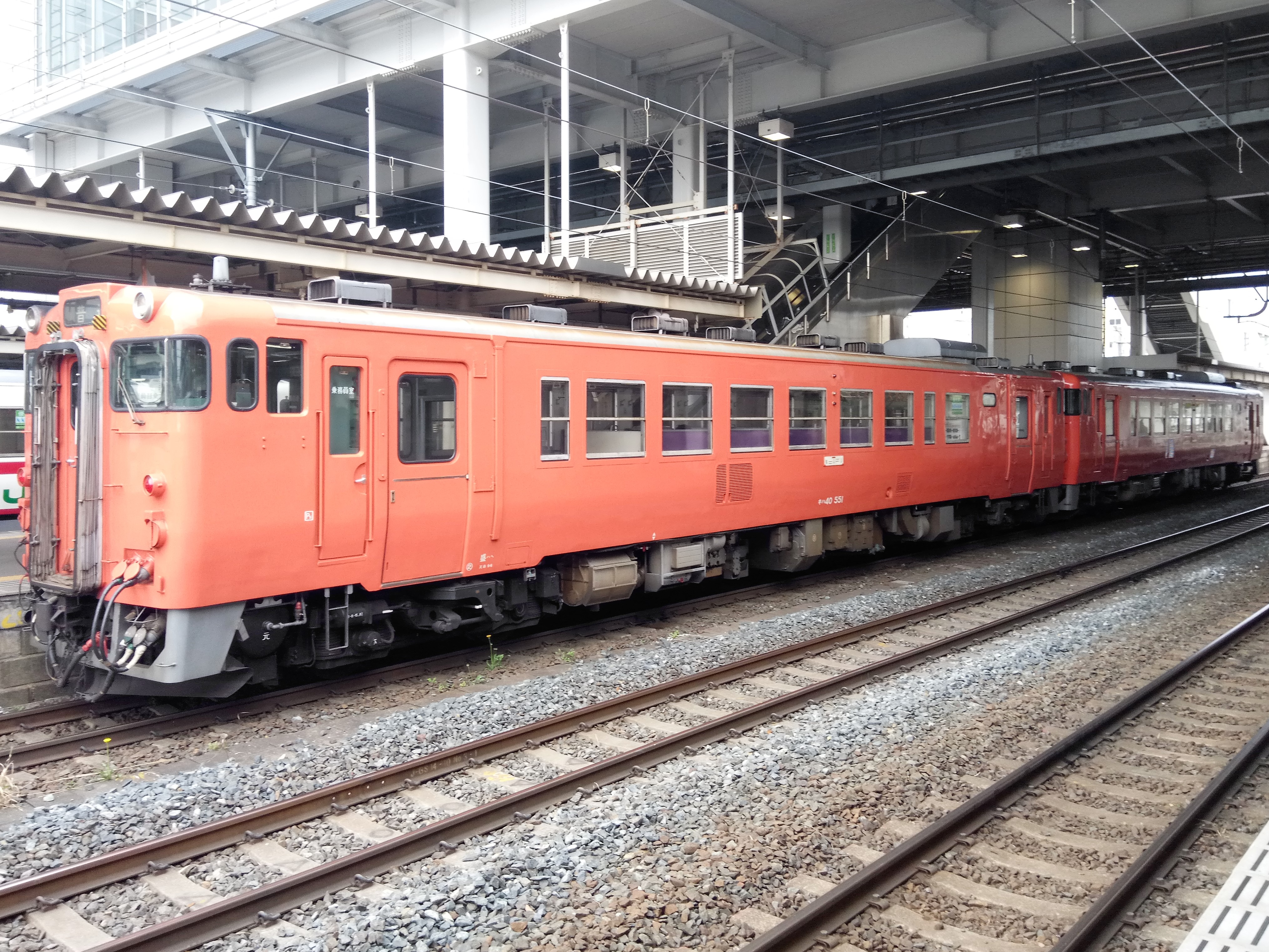 八戸駅にて撮影。